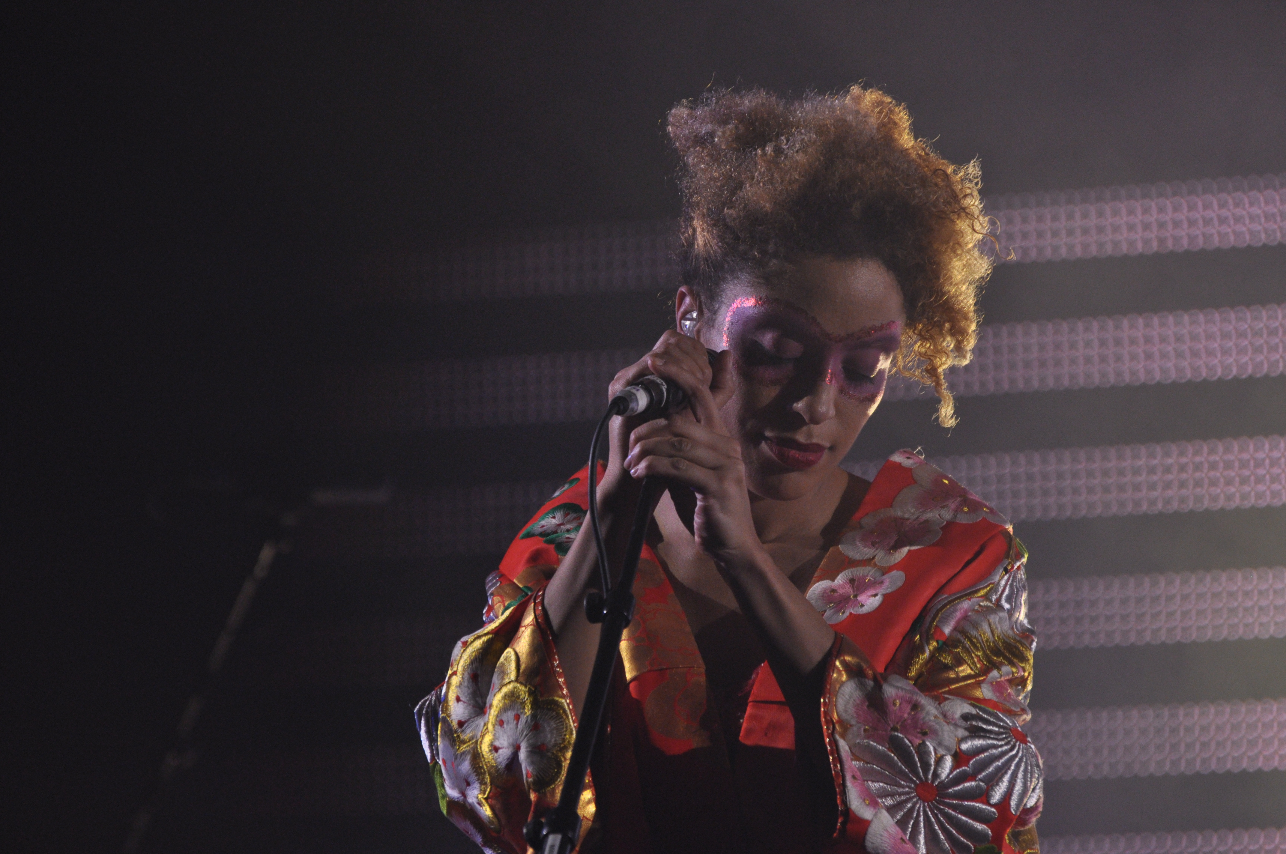 Massive Attack in Conegliano on 08/11/2009.